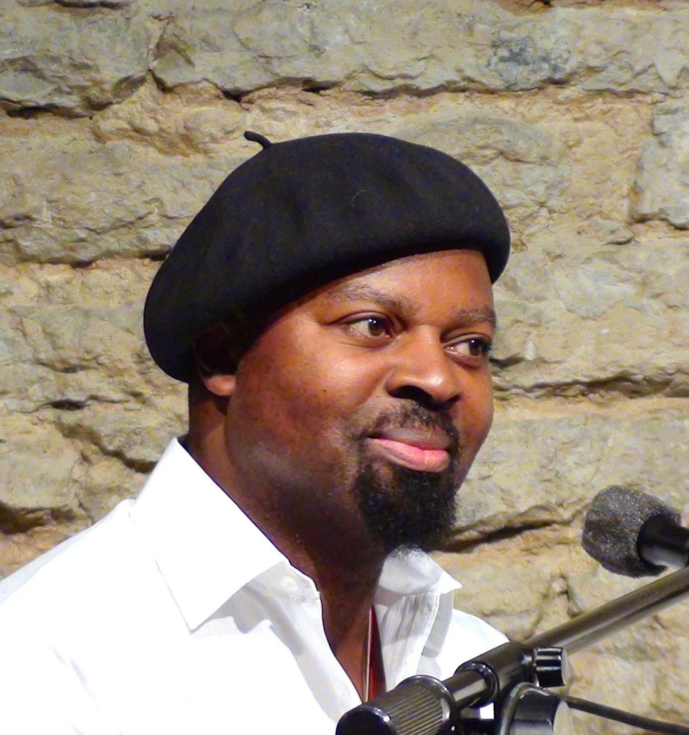 Nigeeria kirjanik Ben Okri Tallinnas Kloostri Aidas kirjandusfestivalil Head Read